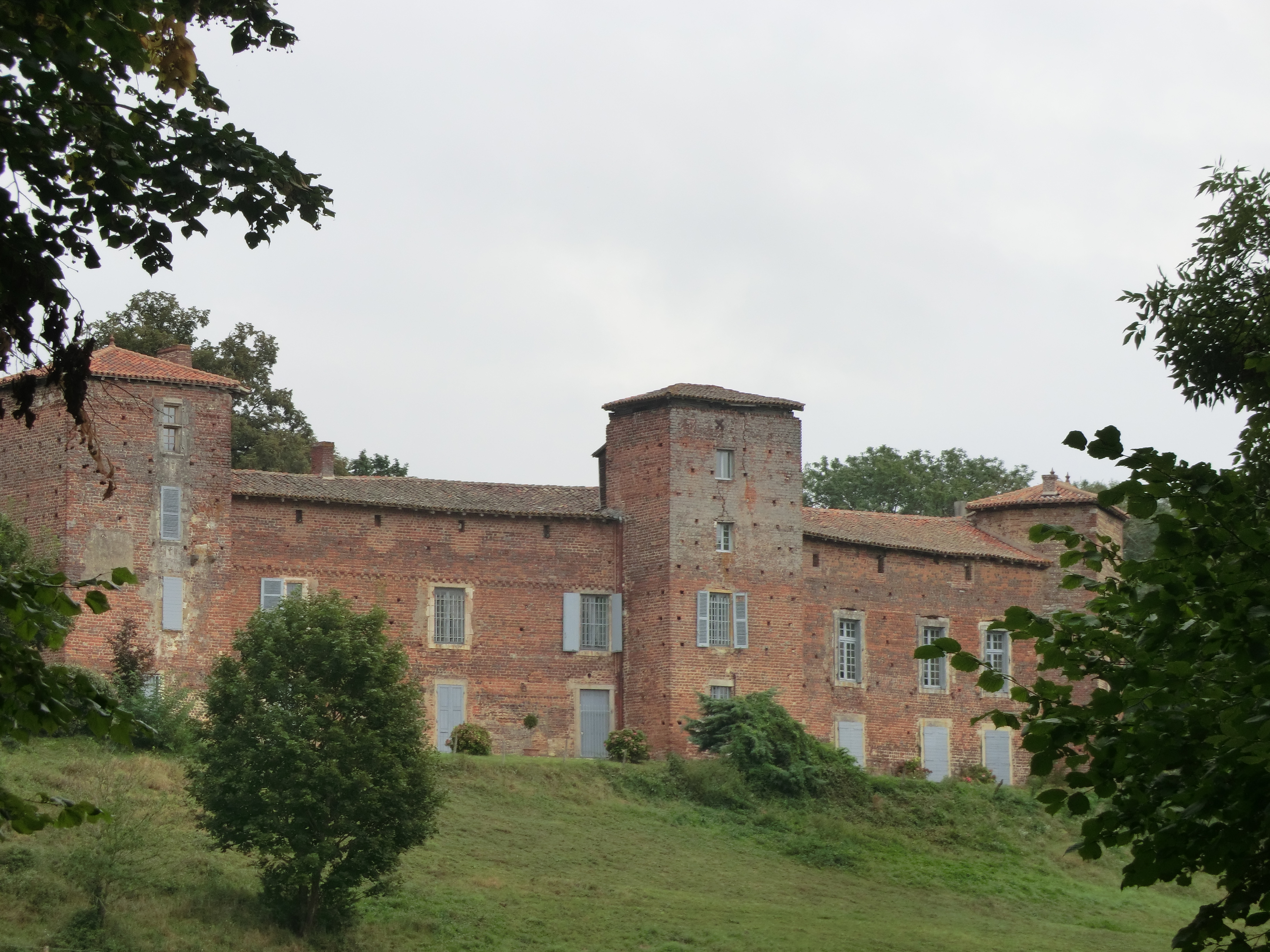 Vue de l'ensemble castral du Montellier. .